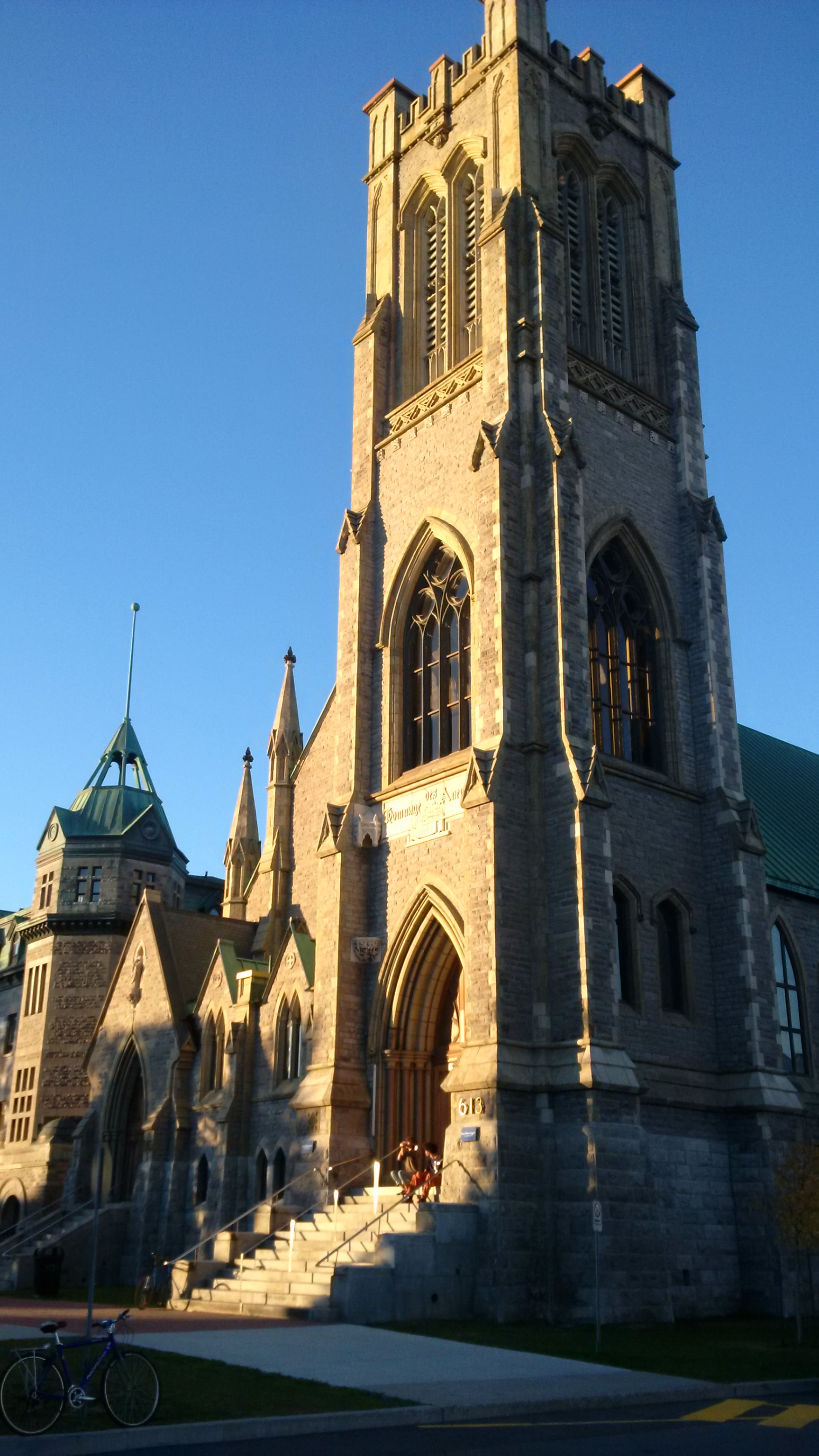 Vue d'ensemble sur le cégep Saint-Laurent. En avant-plan, le pavillon Émile-Legault.